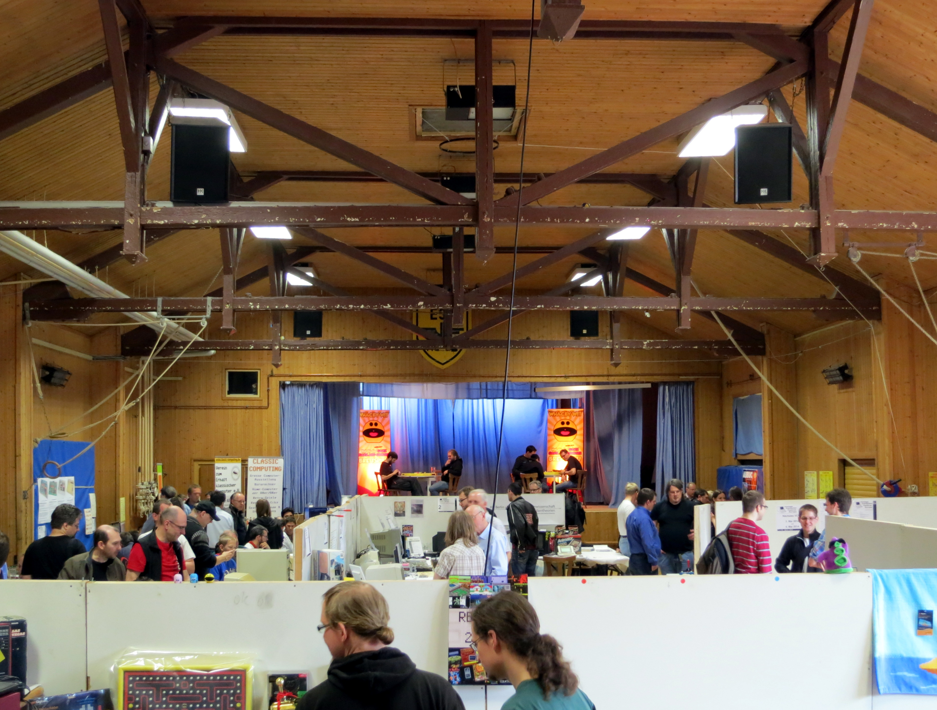 Blick in die Halle des Vintage Computer Festival Europe (VCFe) im Jahr 2013